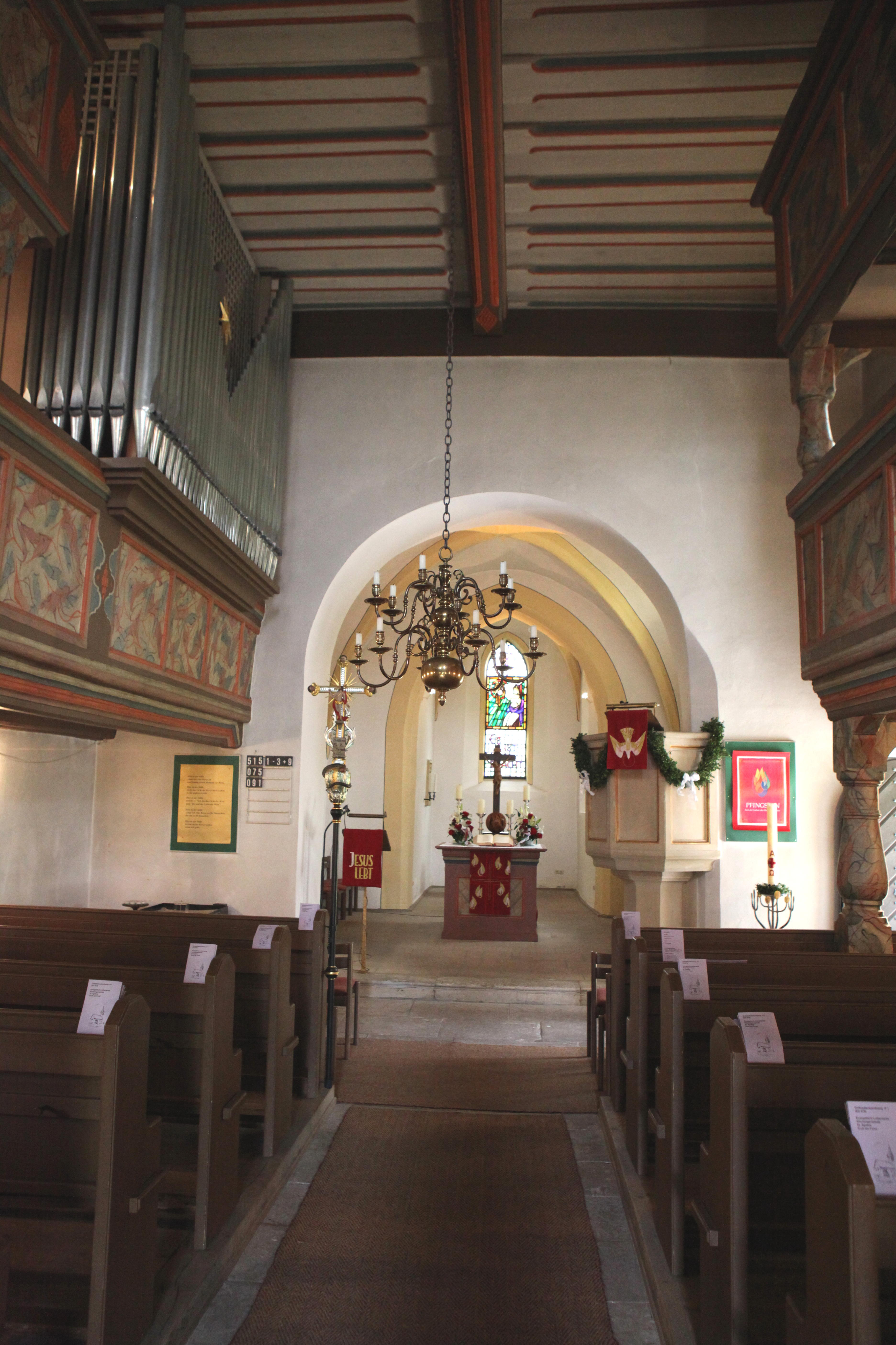 Grub am Forst, St. Ägidius